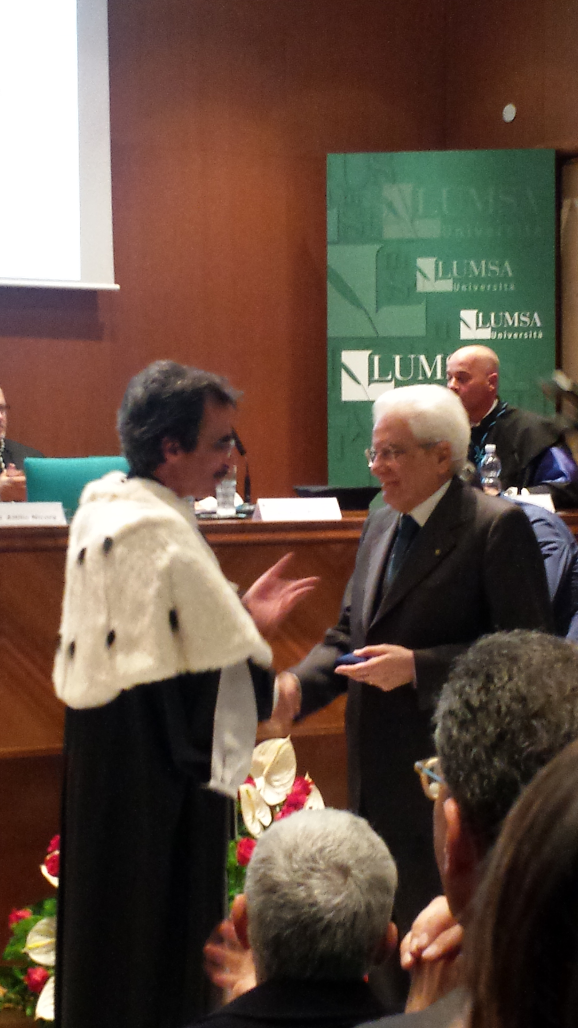 Il rettore prof. Francesco Bonini con il Presidente della Repubblica Italiana Sergio Mattarella all'inaugurazione dell'anno accademico LUMSA 2016/2017.